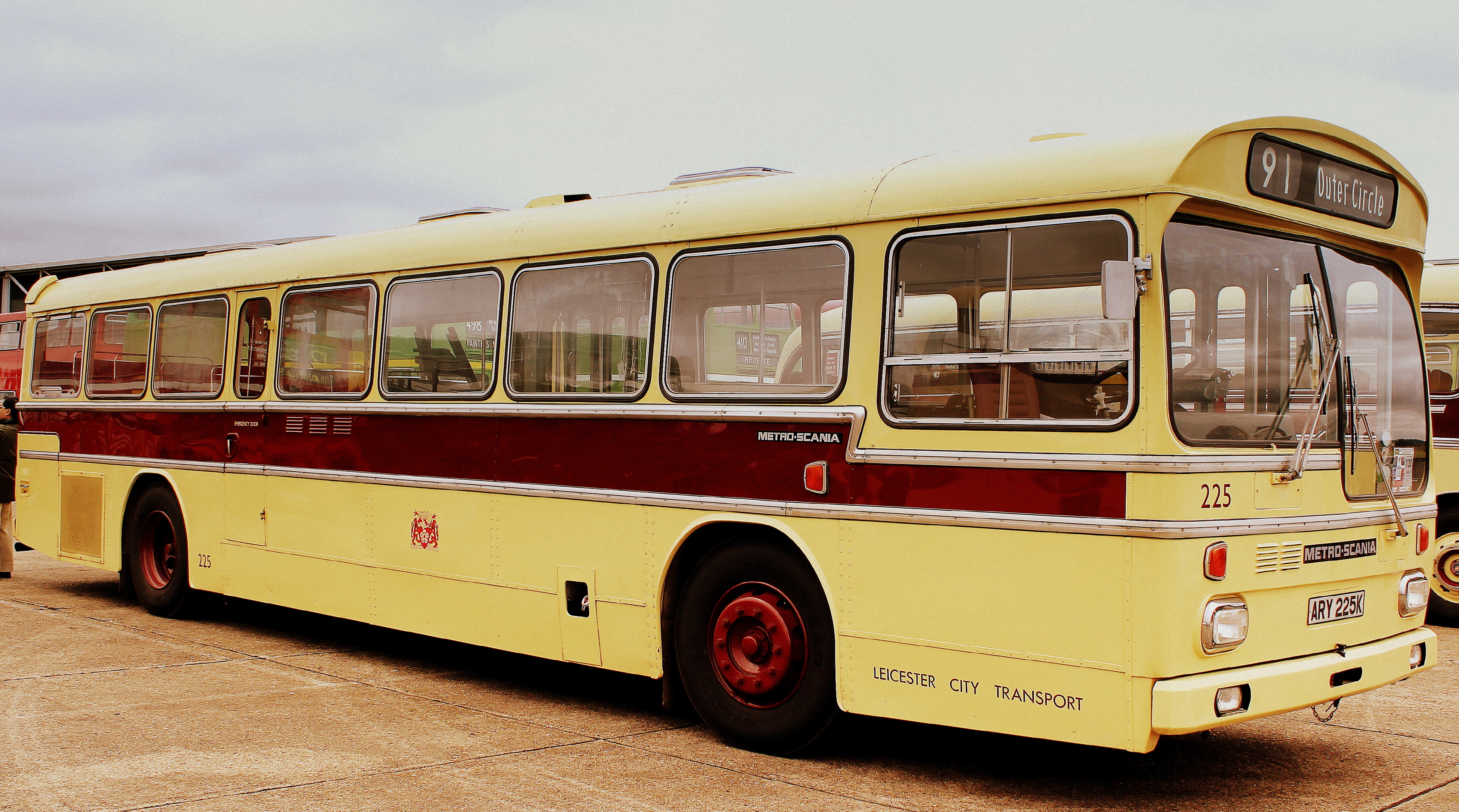 LEICESTER CITY TRANSPORT METRO SCANIA SINGLE DECK SHOWBUS DUXFORD SEP 2012